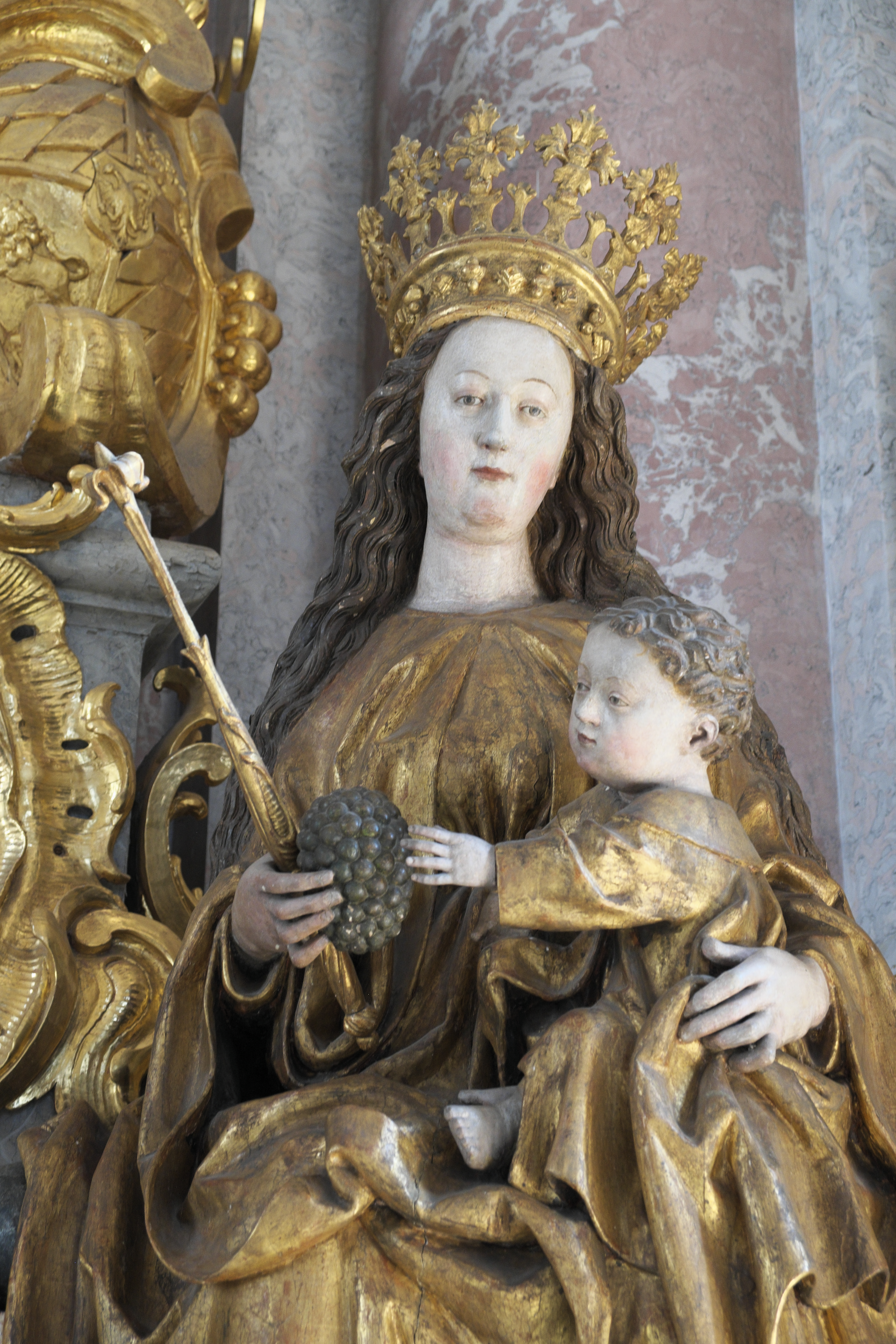 Ehemalige Zisterzienserklosterkirche St. Mariä Himmelfahrt in Fürstenfeldbruck im Landkreis Fürstenfeldbruck (Bayern/Deutschland), Madonna des ursprünglichen spätgotischen Hochaltars